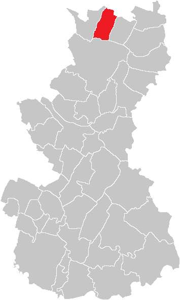 Bezirk Baden